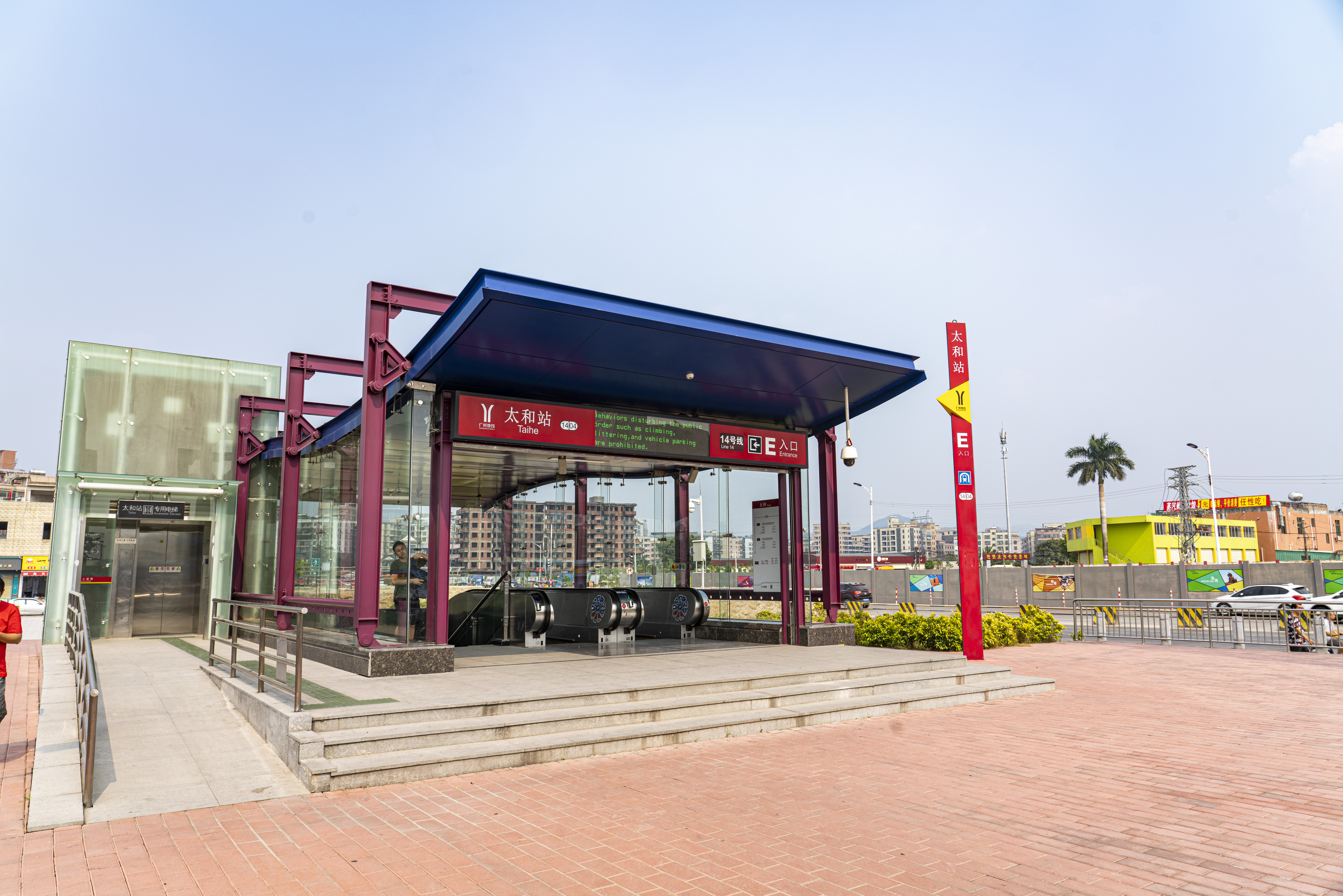 广州地铁太和站E出入口